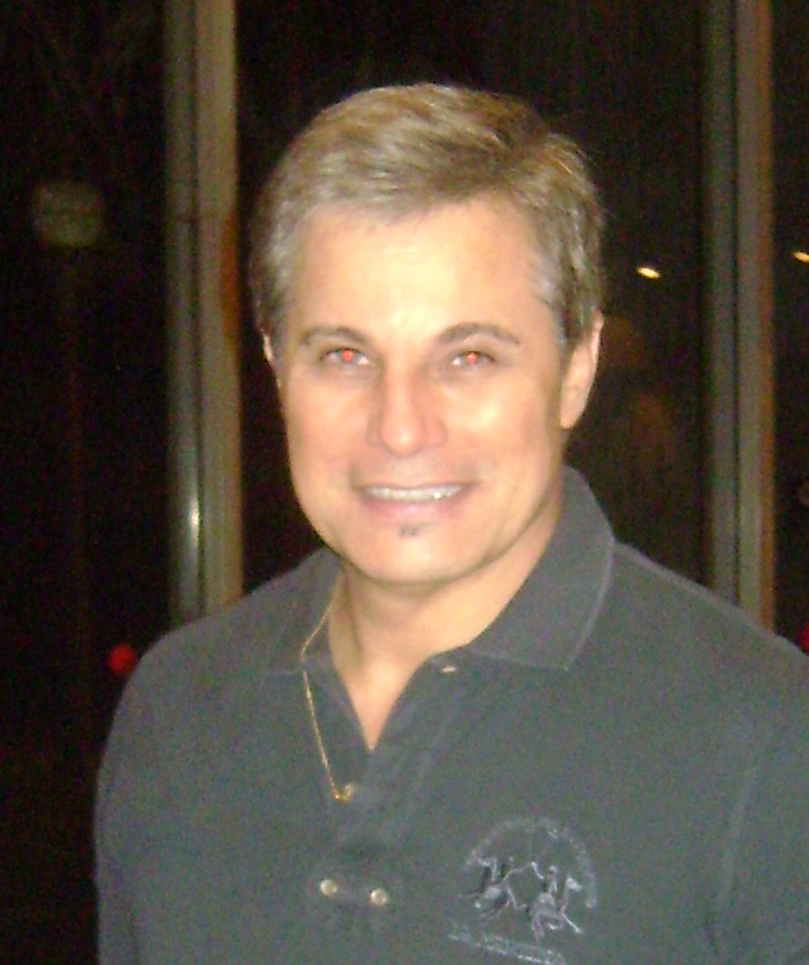 Edson Celulari, ator brasileiro, após a apresentação da peça "Nem um Dia se Passa sem Notícias Suas", em São Paulo.